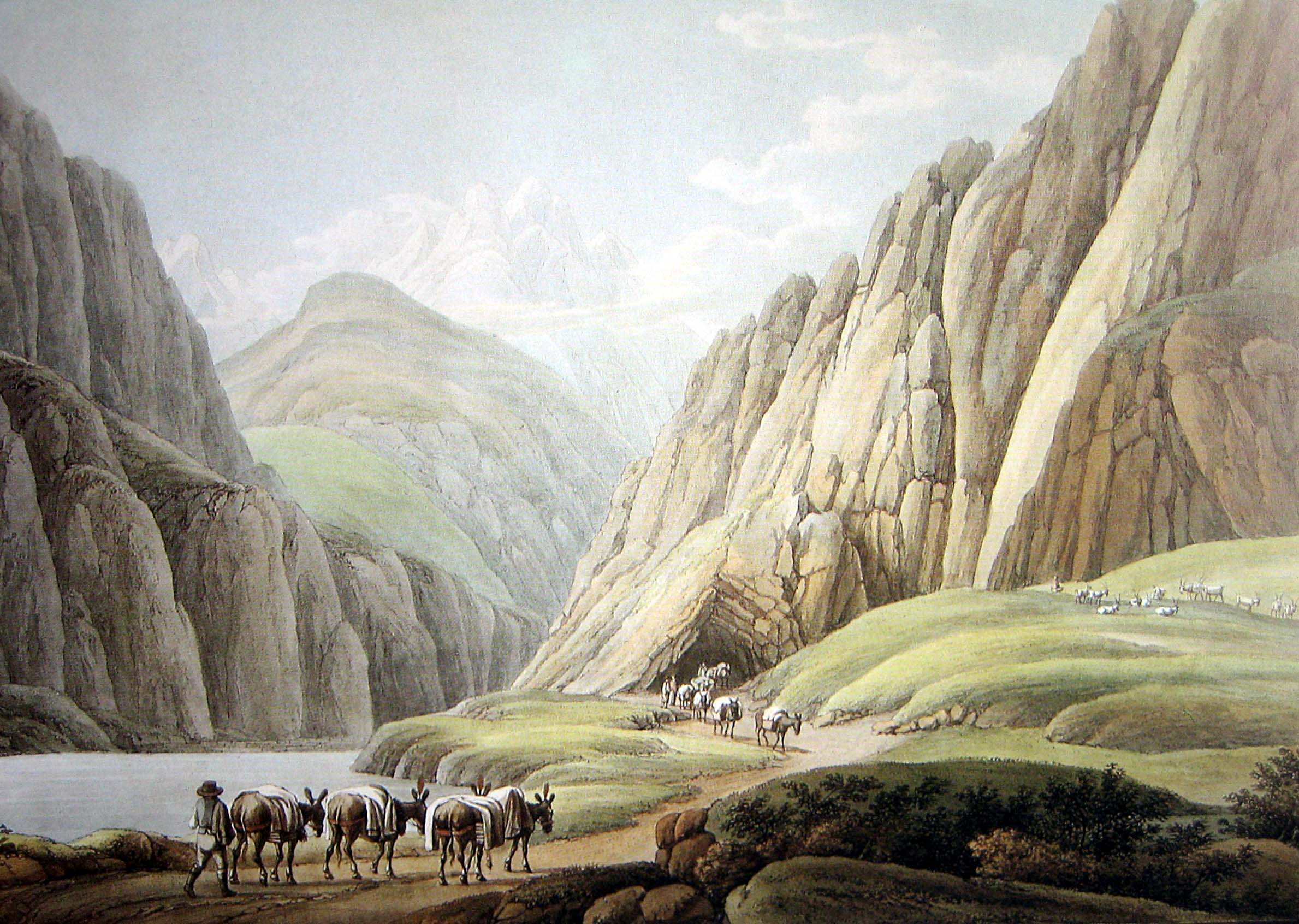 Säumerkolonee beim Urnerloch, 1790, kol. Stich von Rothe nach Jentsch